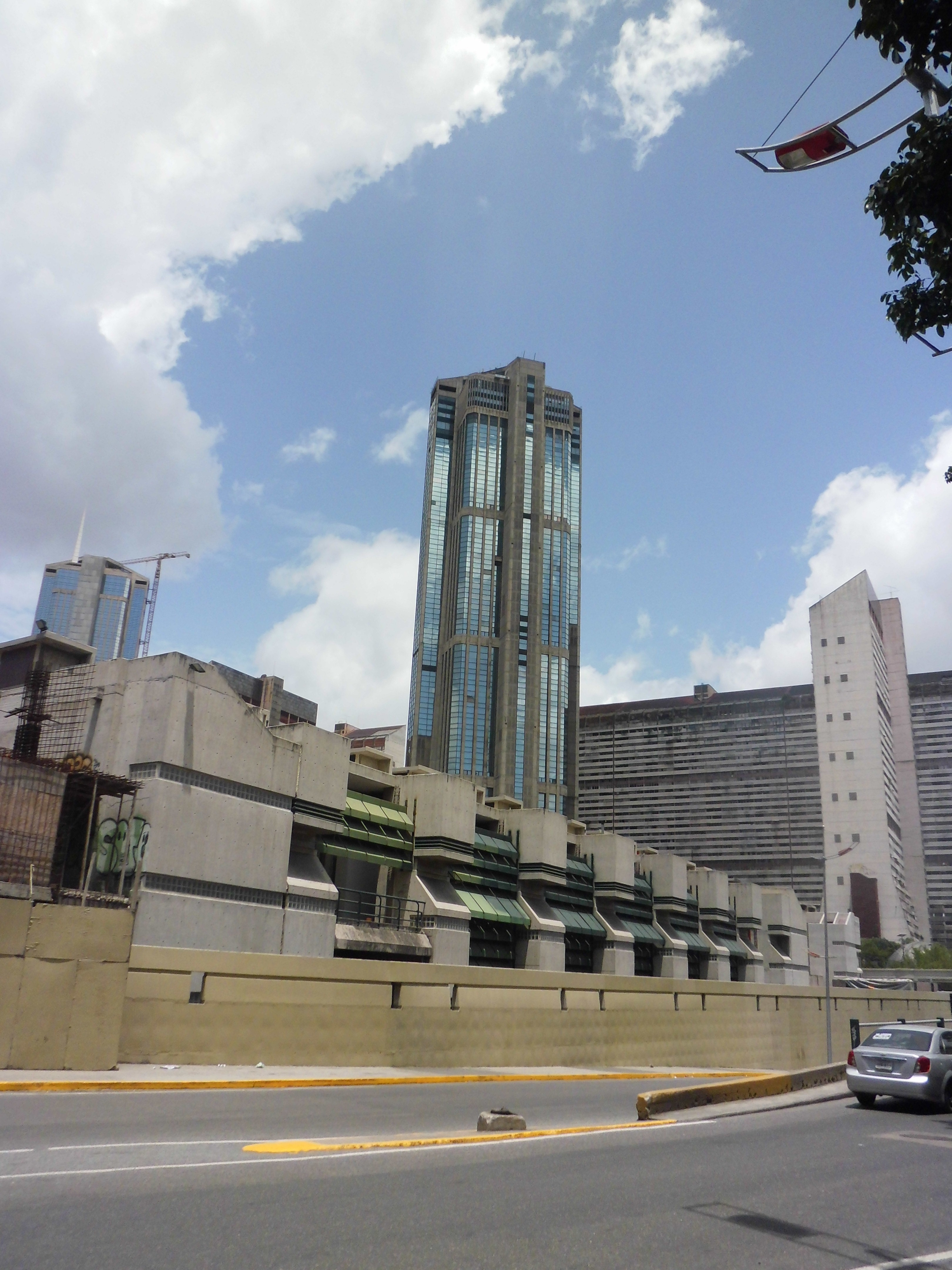 Galería de Arte Nacional, nueva sede desde abril del 2009, Caracas, Distrito Capital - Venezuela.